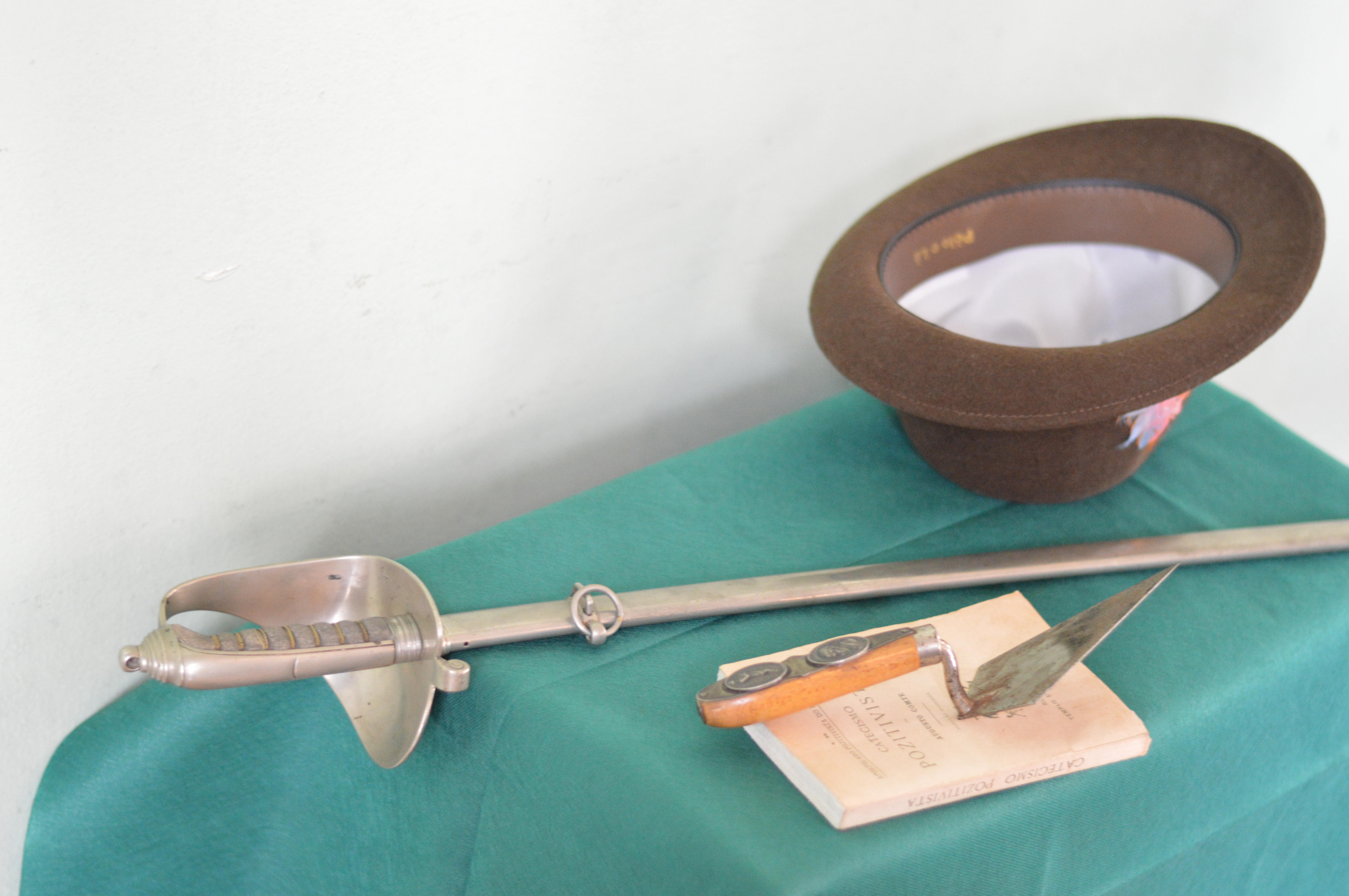 Espada, chapéu, catecismo positivista e trolha na posse de Erlon Jacques de Oliveira